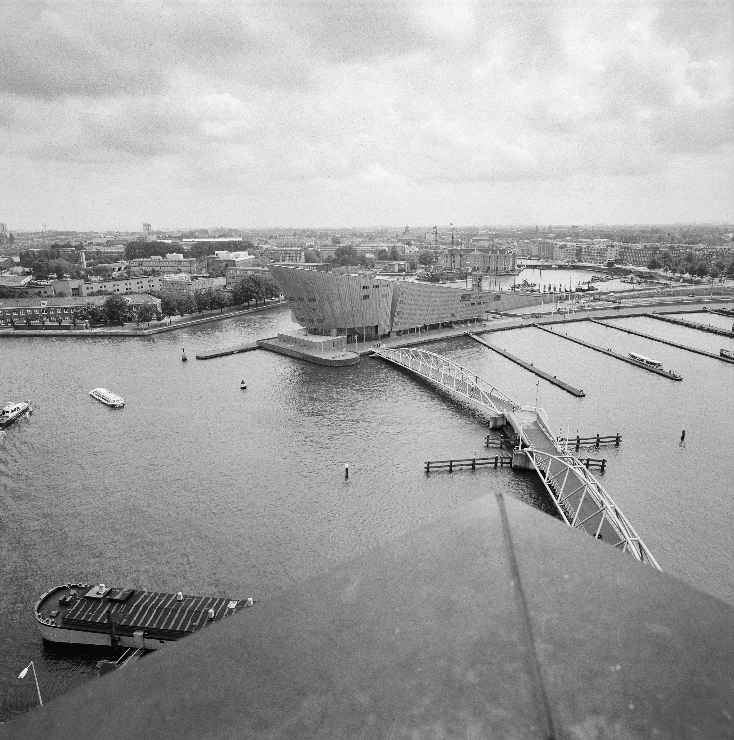 MUSEUM (BOVEN IJ-TUNNEL): Exterieur OVERZICHT